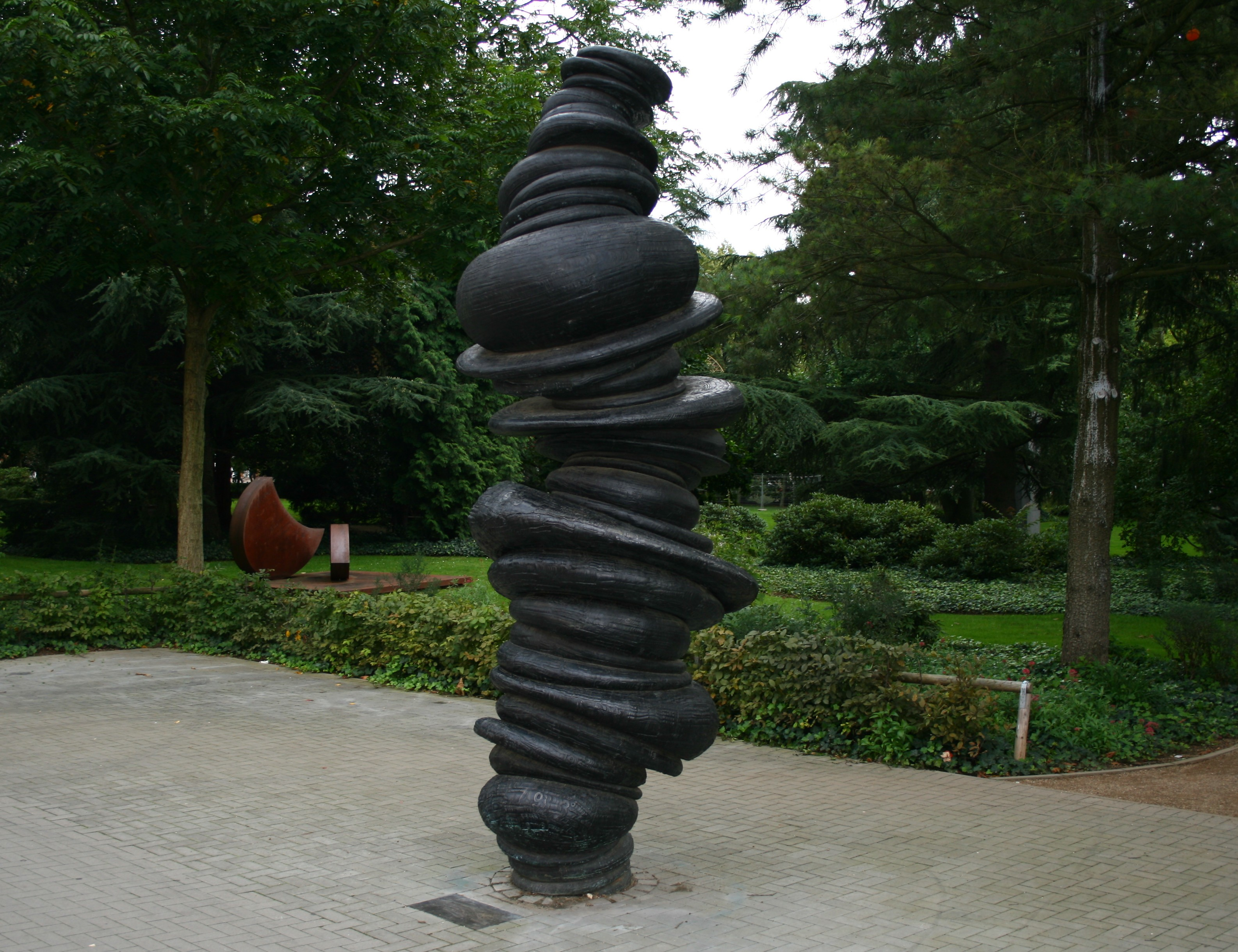 Skulptur "Wirbelsäule" in der Skulpturensammlung Viersen. Selbst fotografiert.